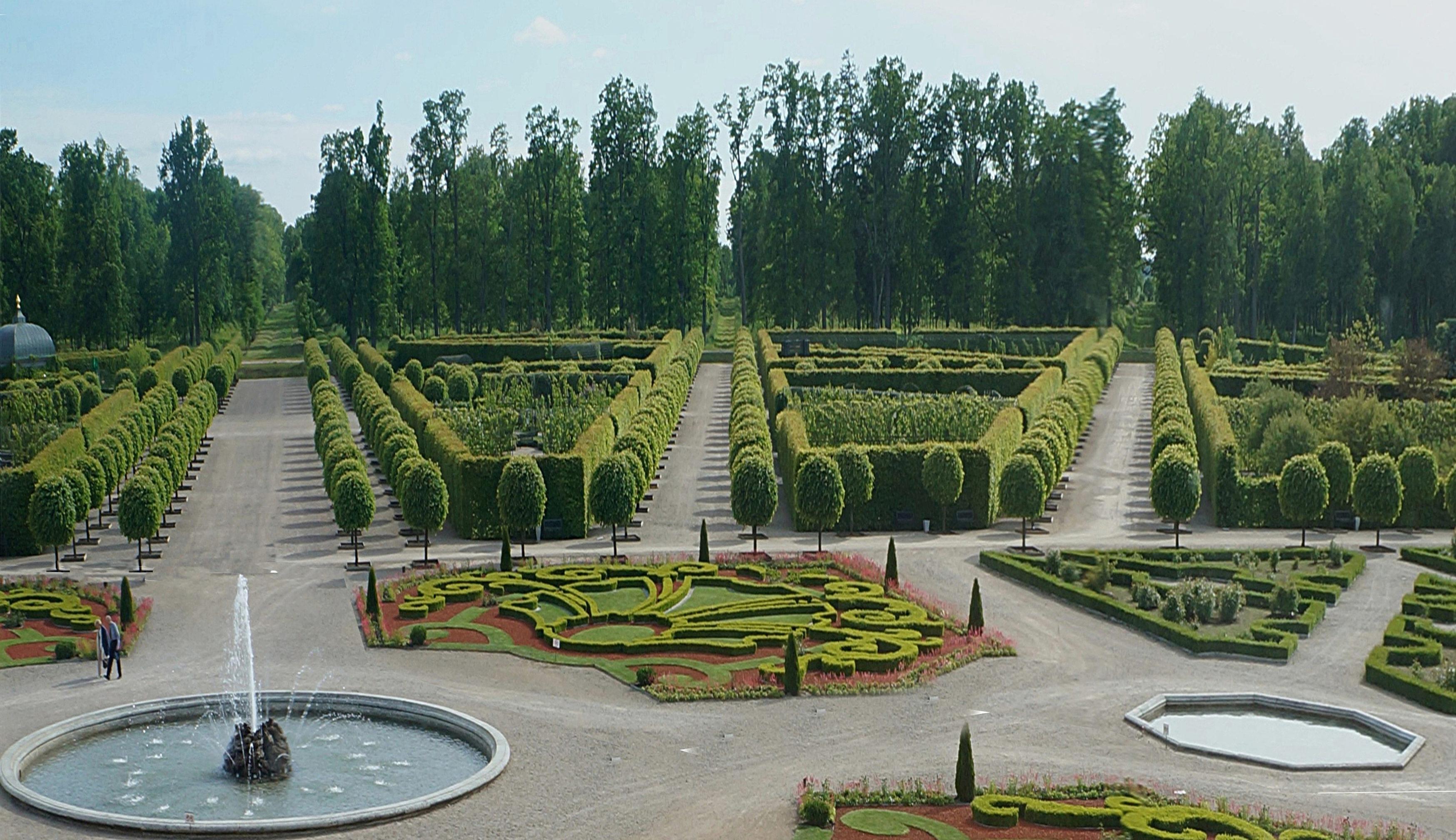 Le parc du Château de Rundale, Rajons de Bauska, Lituanie.